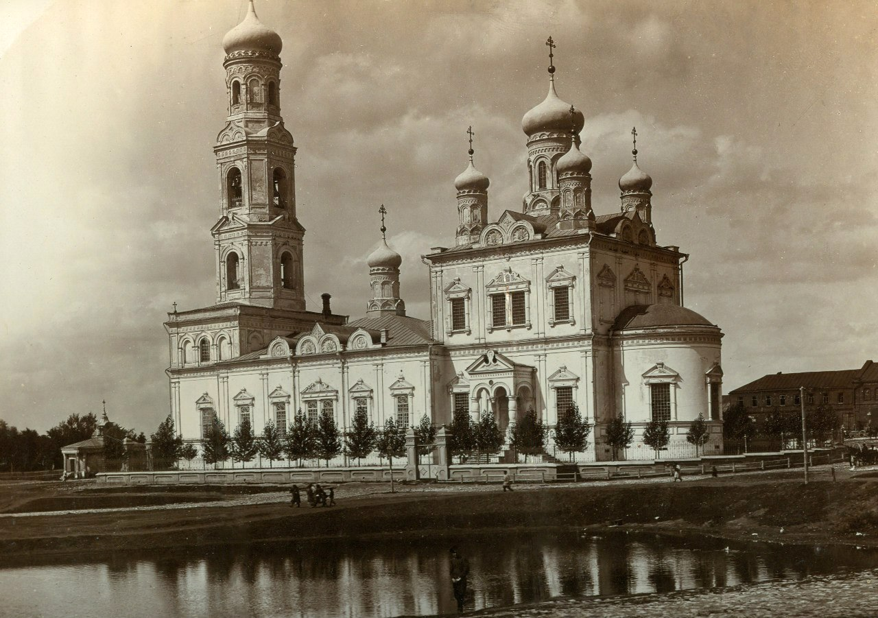 Покровская (ранее - Никольская) церковь г.Скопина Рязанской области (сегодня на этом месте Дворец Культуры)